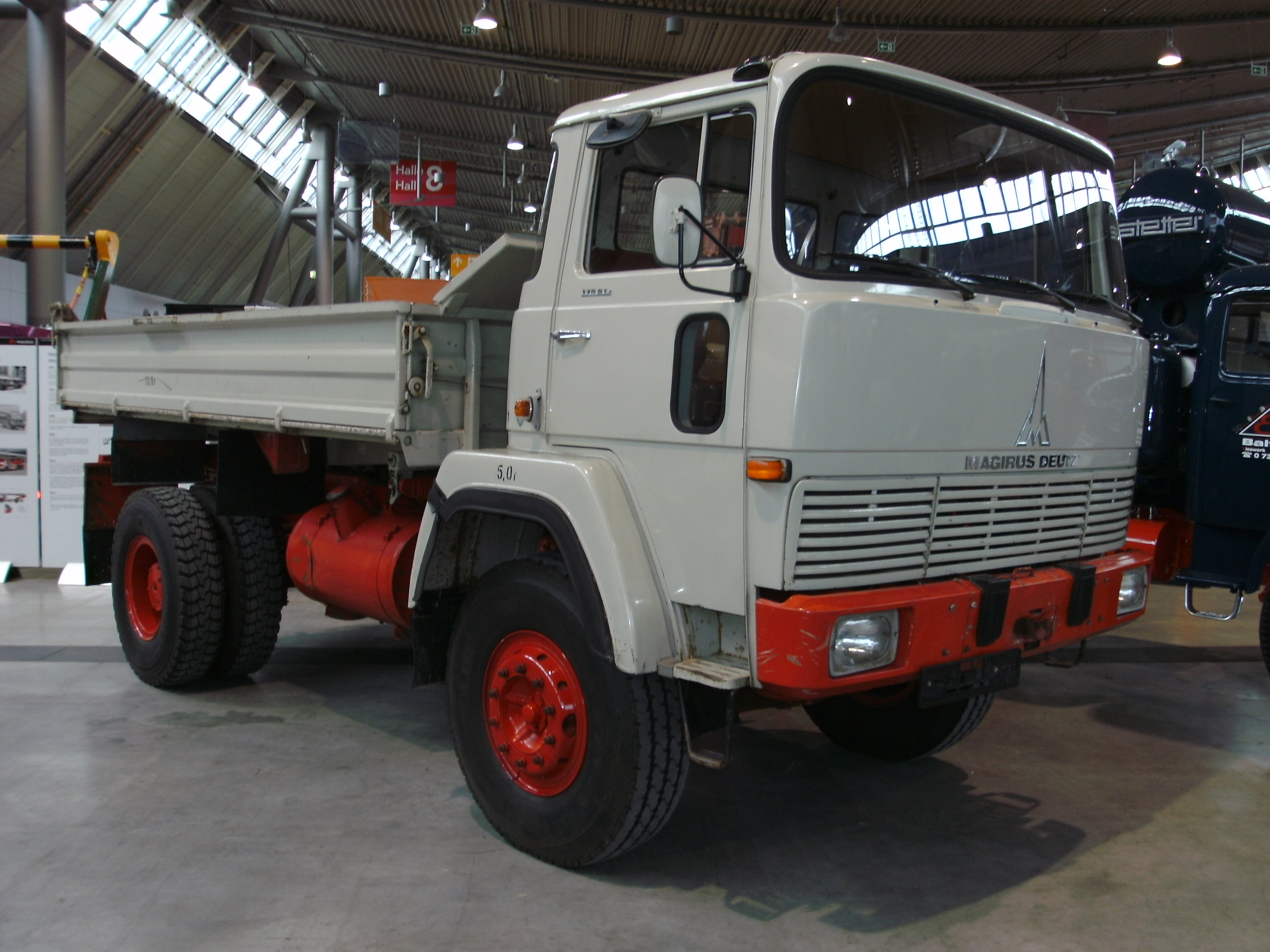 Magirus-Deutz 170D, 170 PS